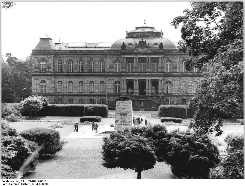 Gotha, Naturkundemuseum ADN-ZB Demme 19.7.1978 Bez. Erfurt Das Naturkundemuseum in Gotha.